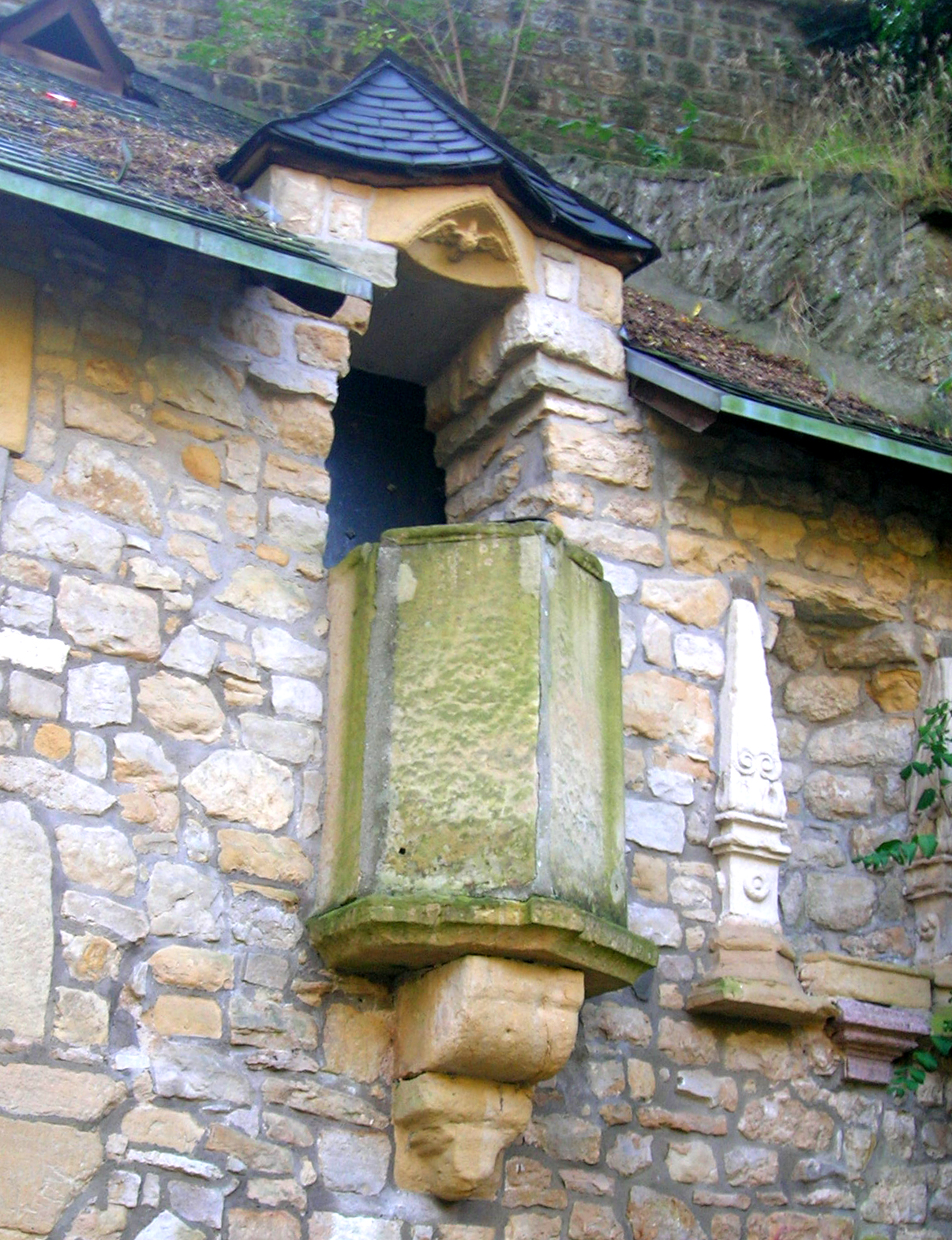 Priedechtstull vun der Greinskapell